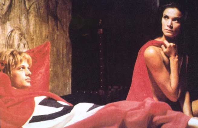 Una scena del film Metti, una sera a cena